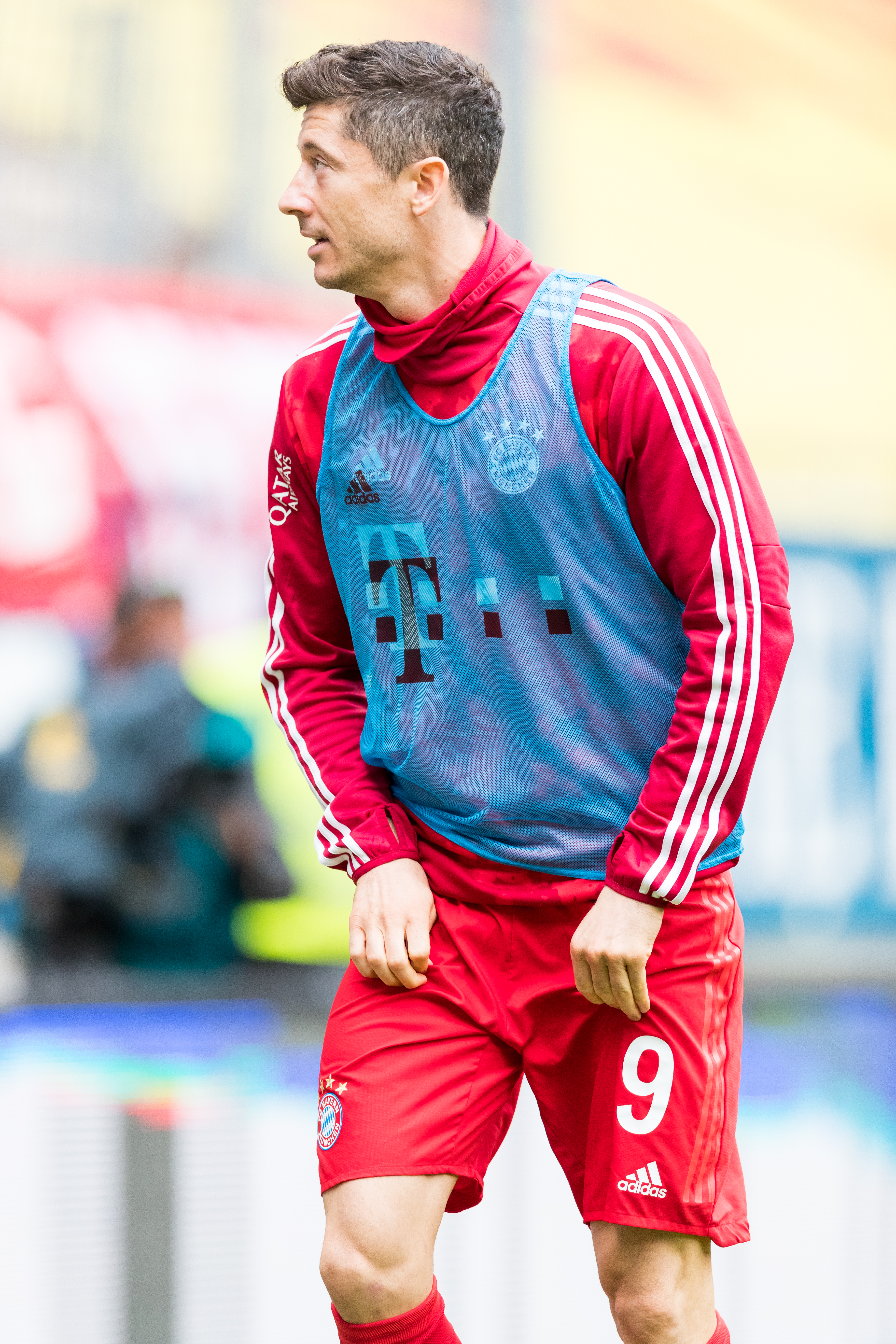 during 1.FC Kaiserslautern vs FC Bayern München at Fritz-Walter-Stadion, Kaiserslautern, Rheinland-Pfalz, Germany on 2019-05-27, Photo: Sven Mandel